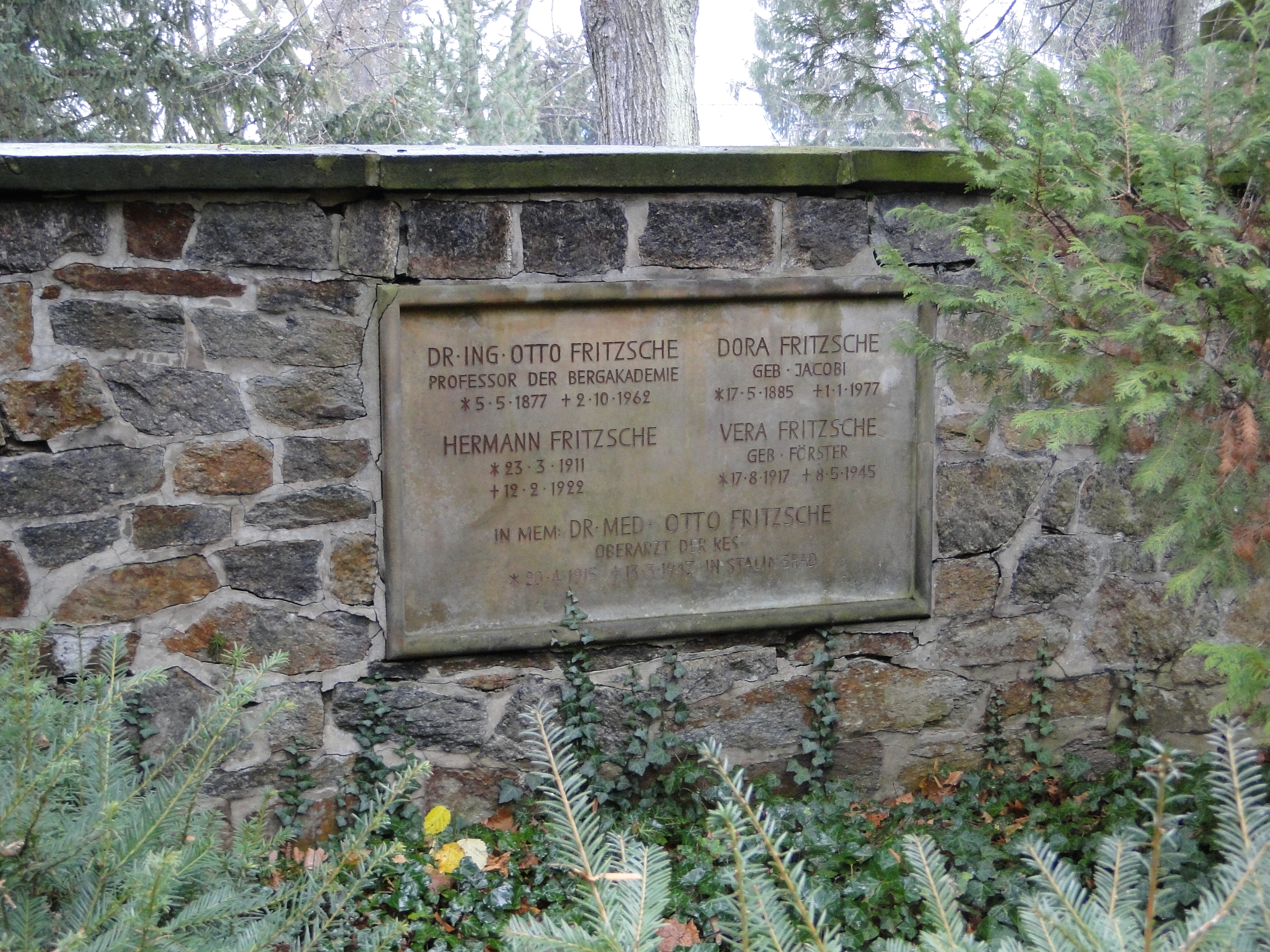 Grab von Otto Fritzsche auf dem Donatsfriedhof in Freiberg